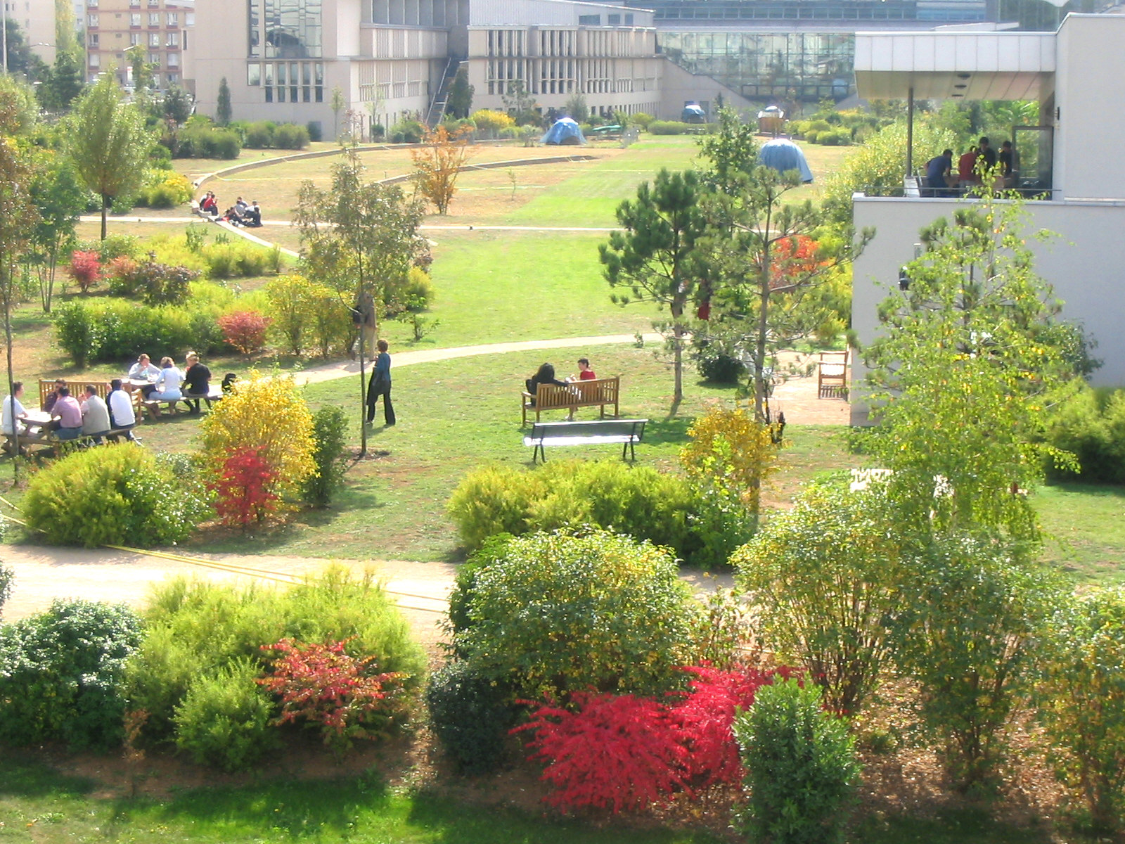 ENS Lyon, automne